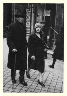 José García-Blanco Romero. Ingeniero de Montes. Madrid.